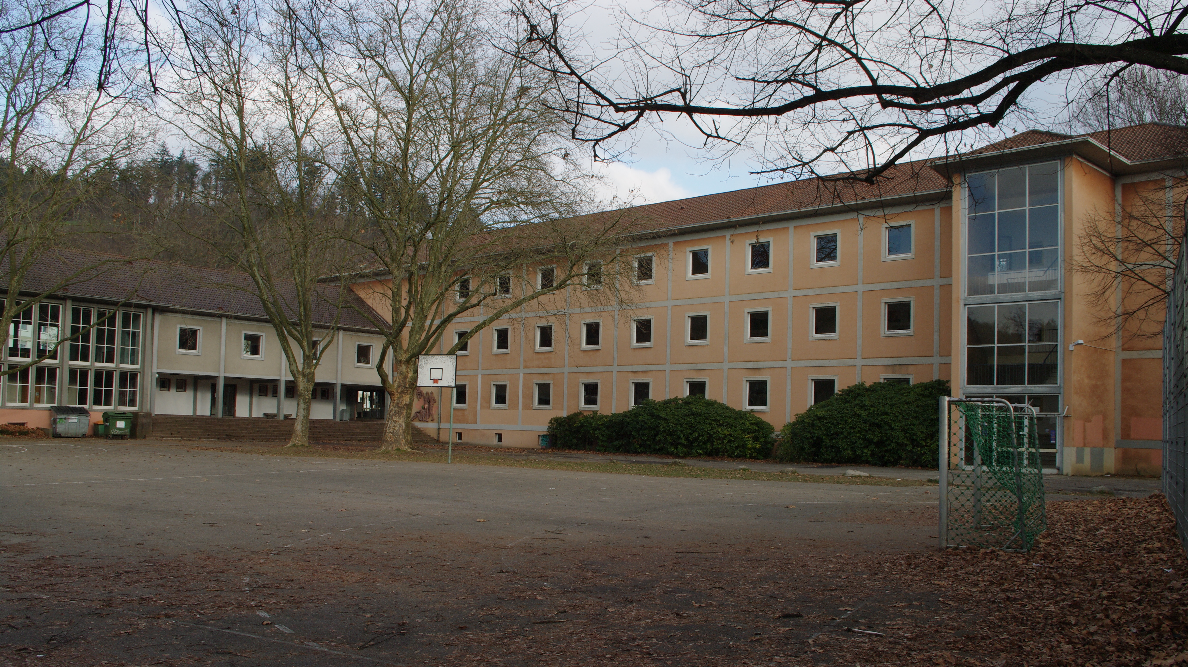 Blick auf den Haupteingang des Berthold Gymnasiums und den kleinen Schulhof mit Hartplatz